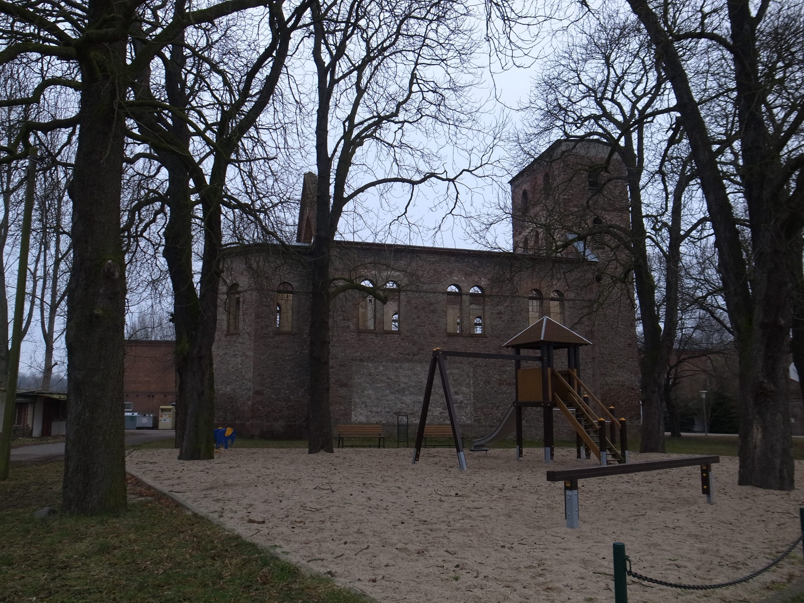 Reinsdorf (Südliches Anhalt), Kirchenruine